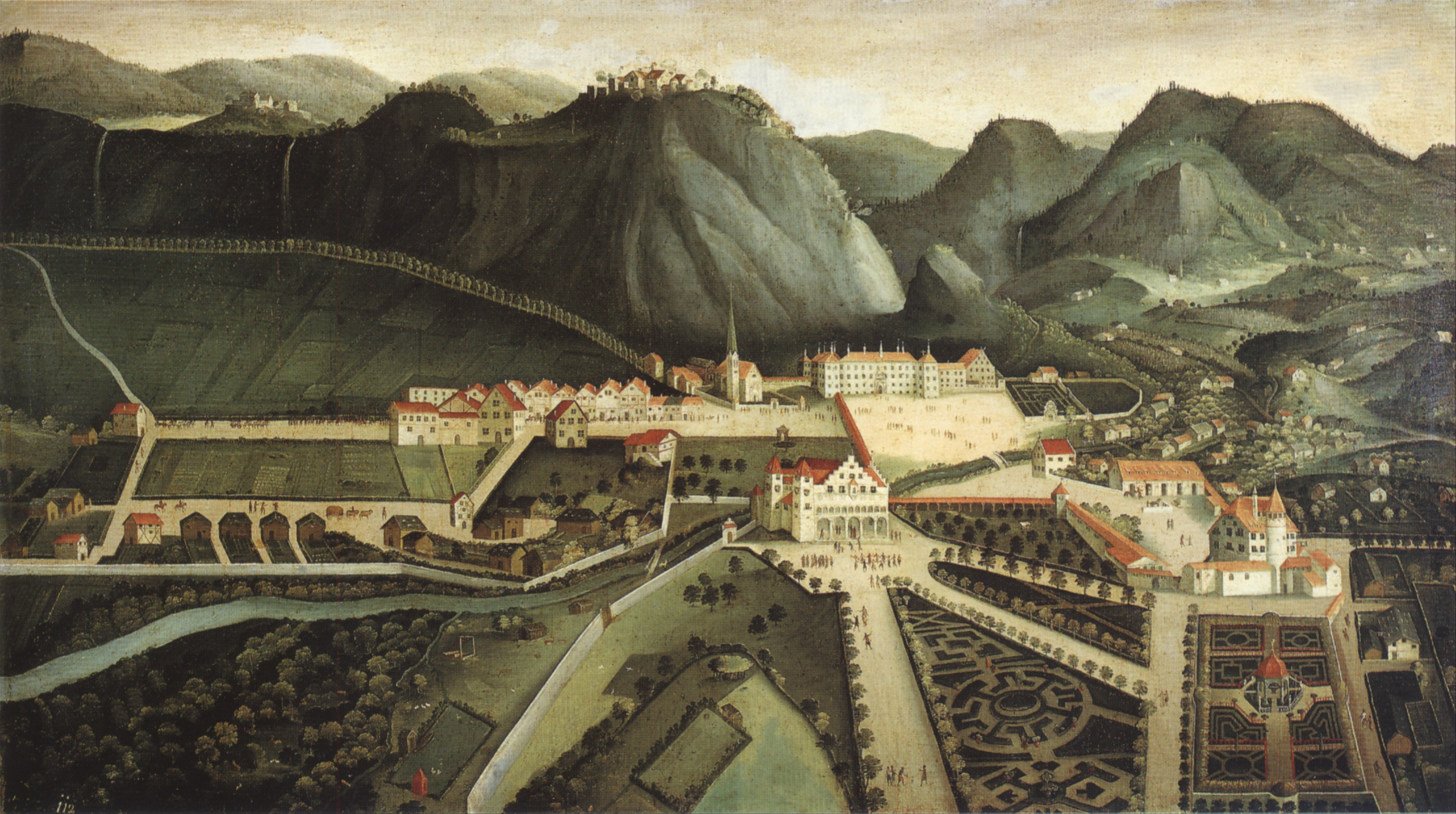 Ansicht von Hohenems mit Schloss, Lusthaus und Gartenanlage. Öl auf Leinwand. Salzburg, Museum Carolino-Augusteum